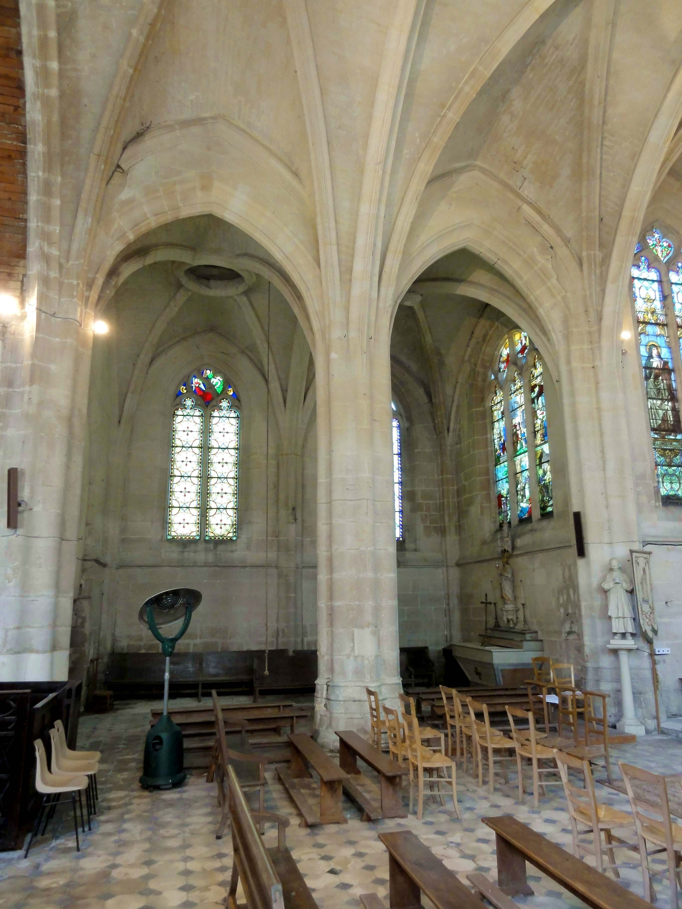 Intérieur de l'église (voir titre).